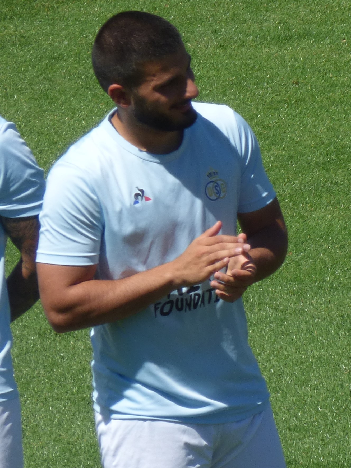 Deniz Undav lors du match amical RC Lens / Union Saint-Gilloise, le 5 août 2020, au Stade Paul-Guerre de Billy-Montigny.